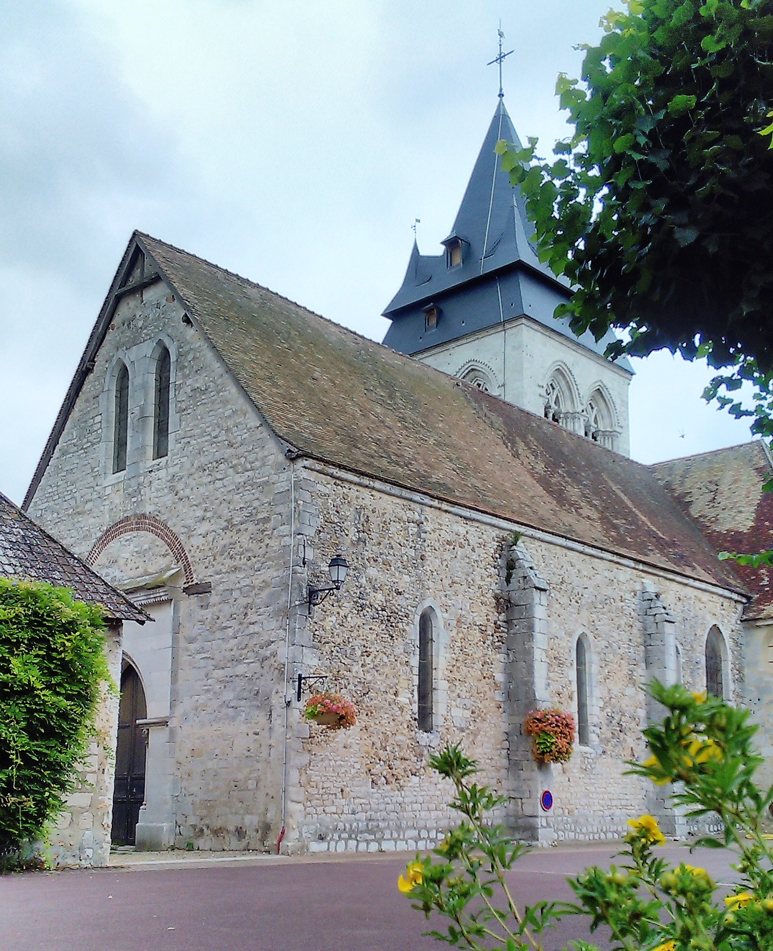 Autour de l'église Saint-Pierre, à Saint-Pierre-d'Autils, commune déléguée de La Chapelle-Longueville (Eure). Clocher classé au titre des Monuments historiques ravalé en 2017-2018.